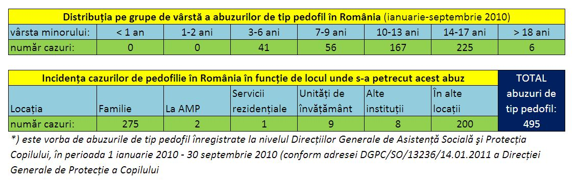 statistici cu privire la numarul de cazuri de pedofilie la minori in perioada ianuarie - septembrie 2010, am raspunsul oficial al dansilor ca proba